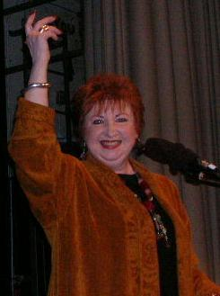 Luba Goy, Canadian comedienne.